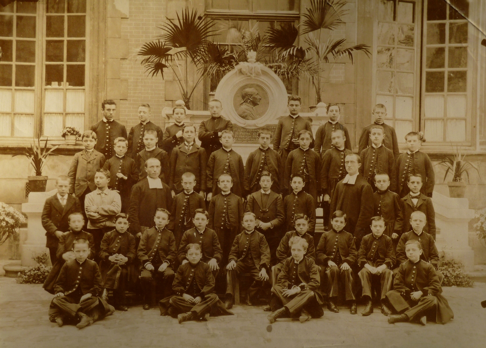 Photo de classe, école commerciale des Francs-Bourgeois à Paris vers 189O . Photographe inconnu. Dimension cliché : 17,5 x 12,5 cm. Collection privée. (Dans le médaillon : Frère Joseph Josserand).